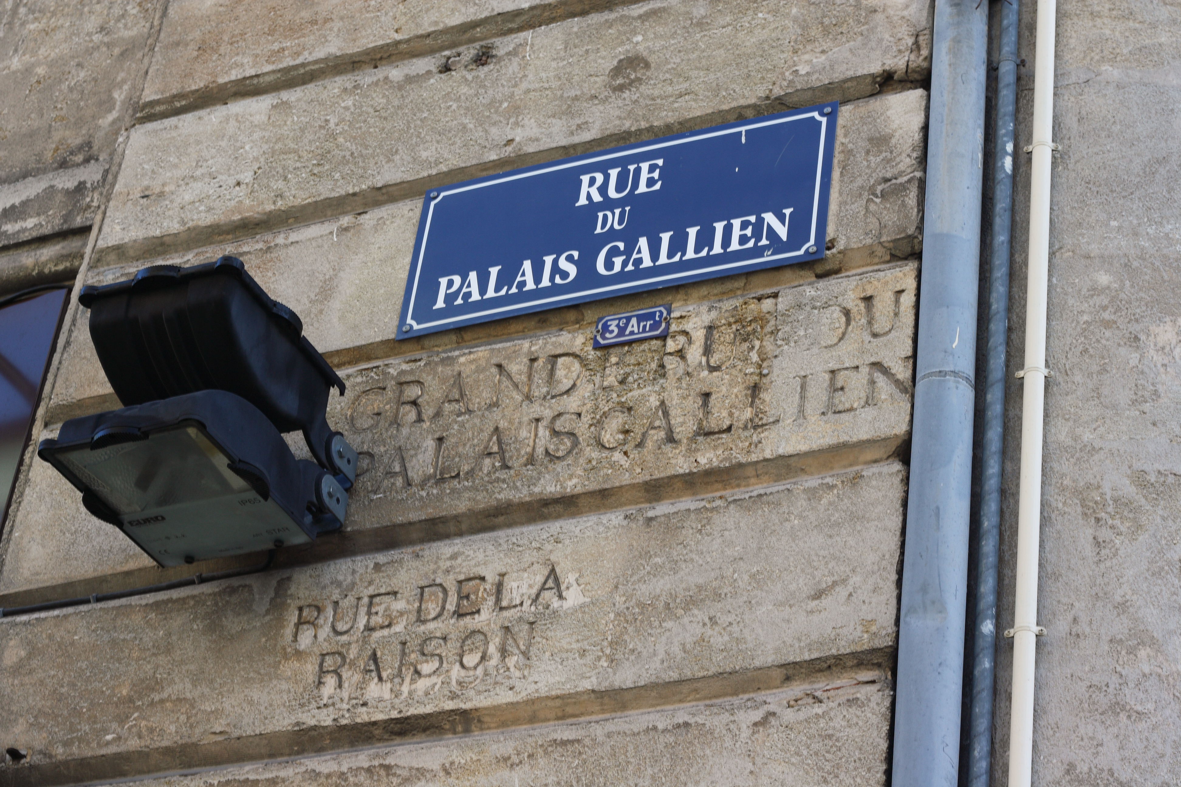 Straßenschild RUE DU PALAIS GALLIEN in Bordeaux (Region Aquitanien, Frankreich)